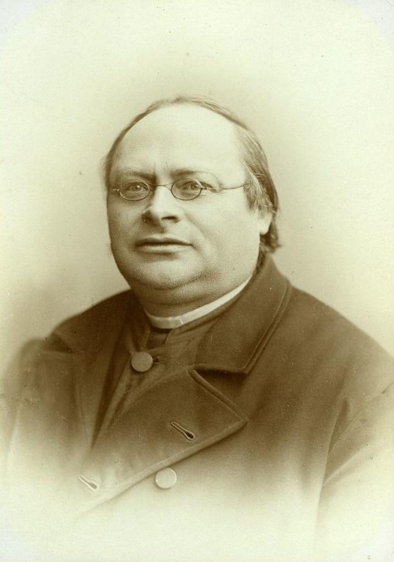 W.F.N van Rootselaar